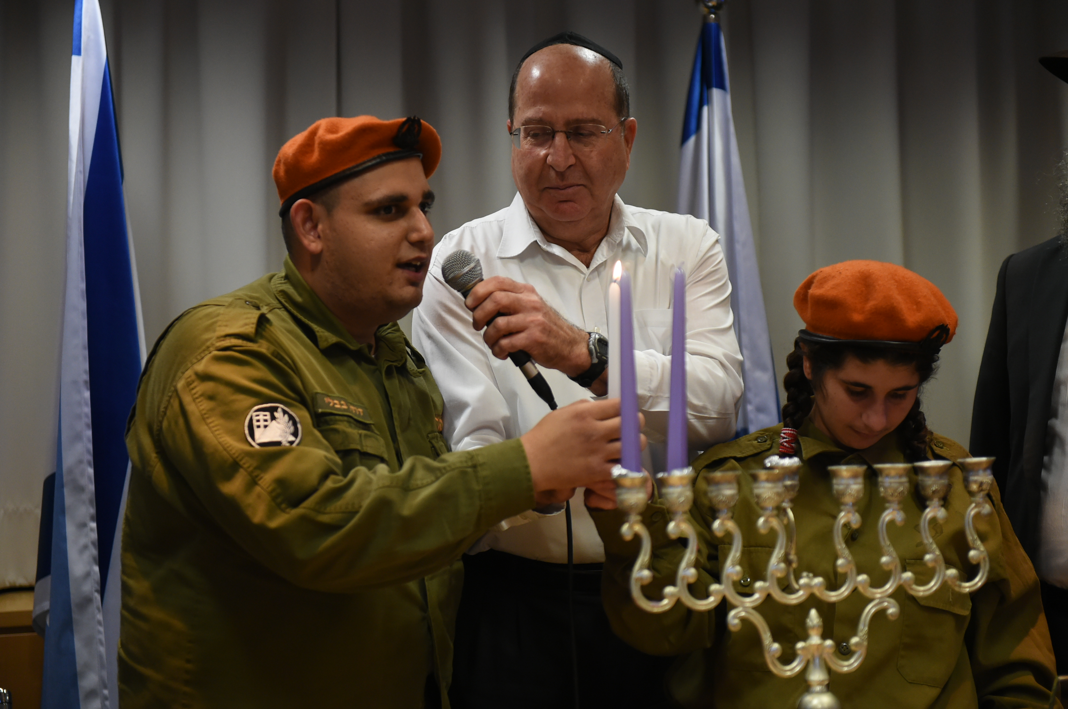 שר הביטחון בוגי יעלון מארח את צעירי גדולים במדים להדלקת נרות חנוכה (2017)